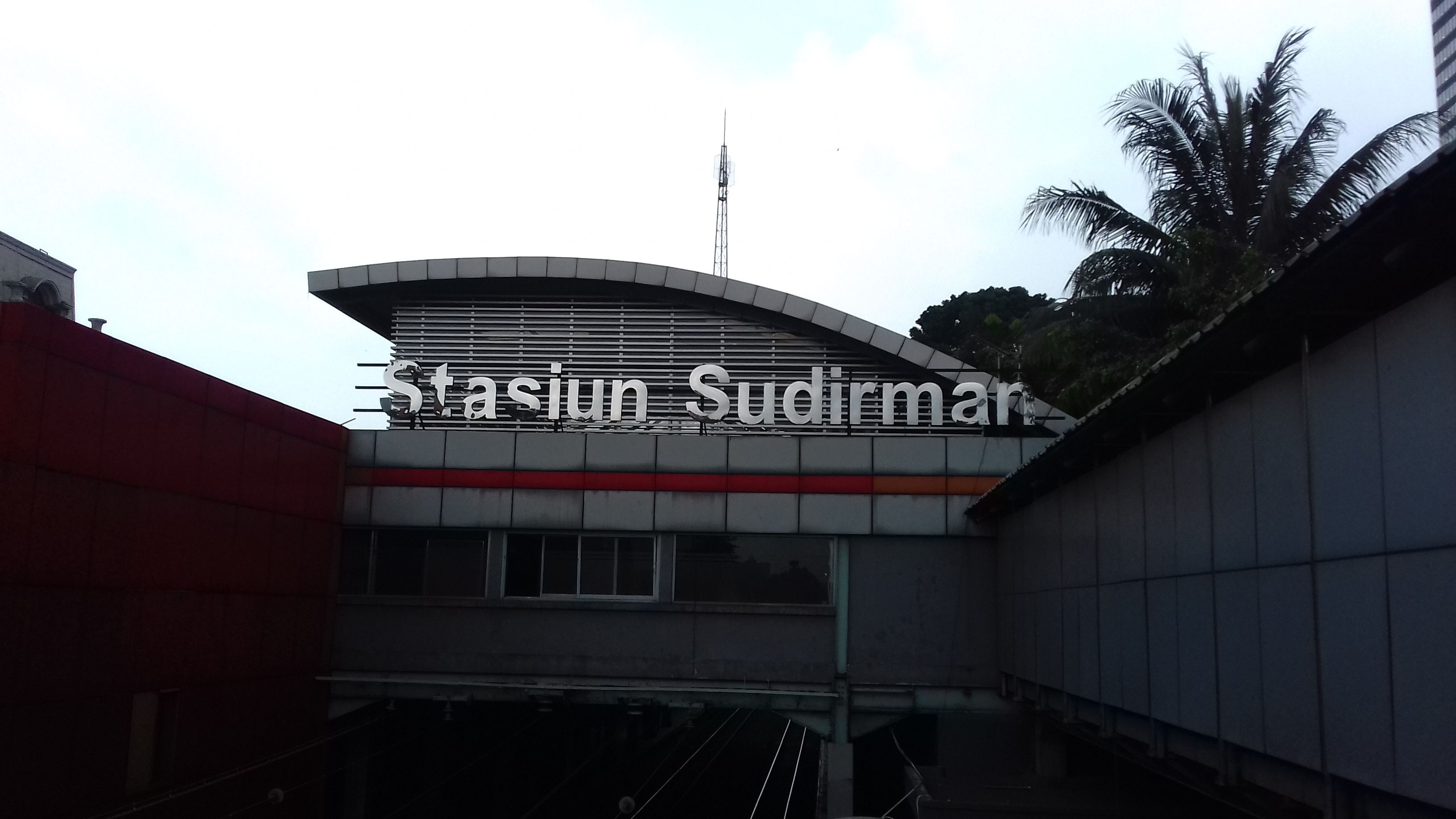 Stasiun Sudirman